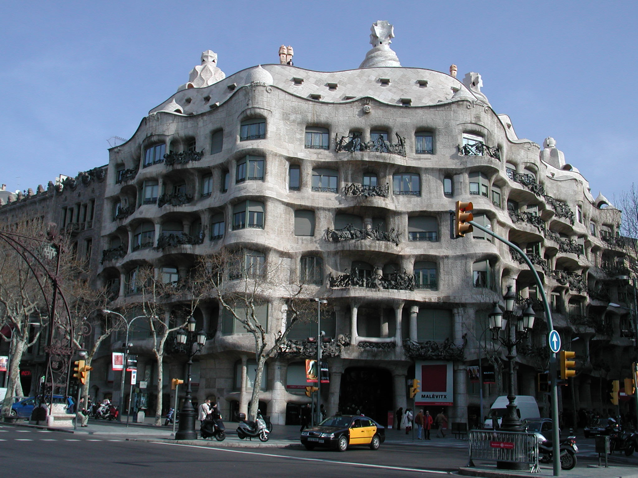 Casa Milà, Barcelona di Antoni Gaudí i Cornet